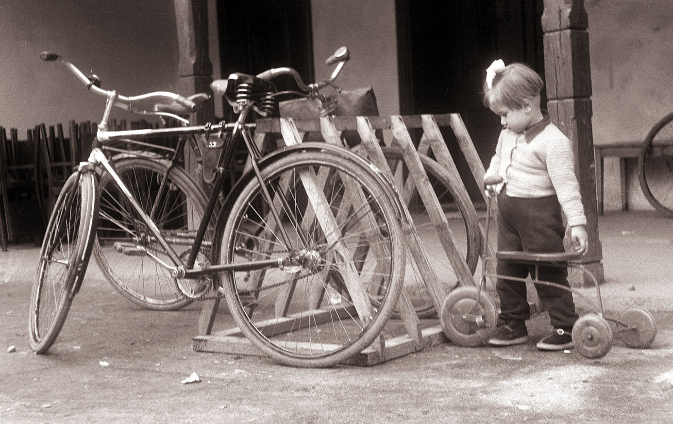 Stojalo za kolesa v Prekmurju